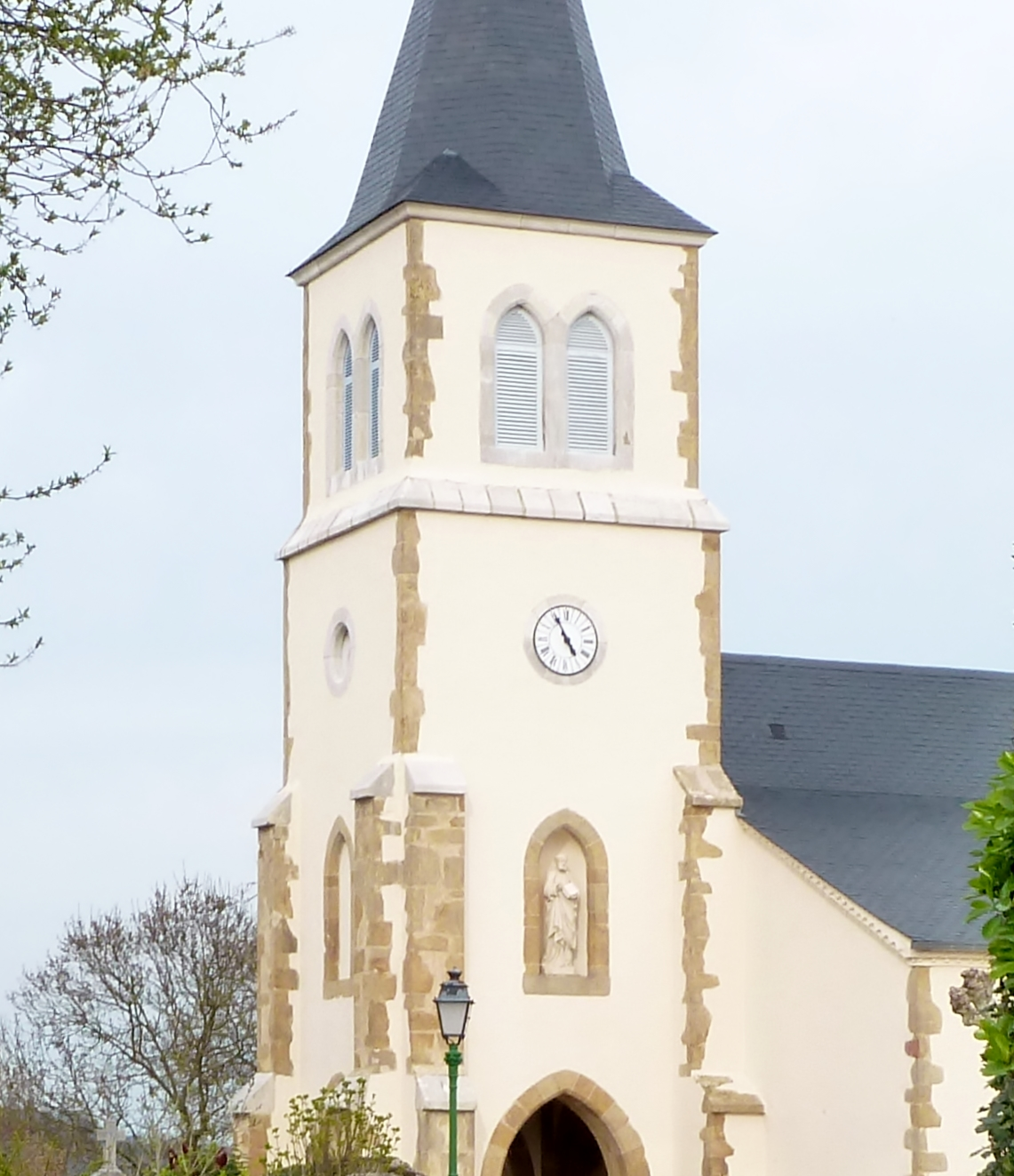 Église de Baliracq